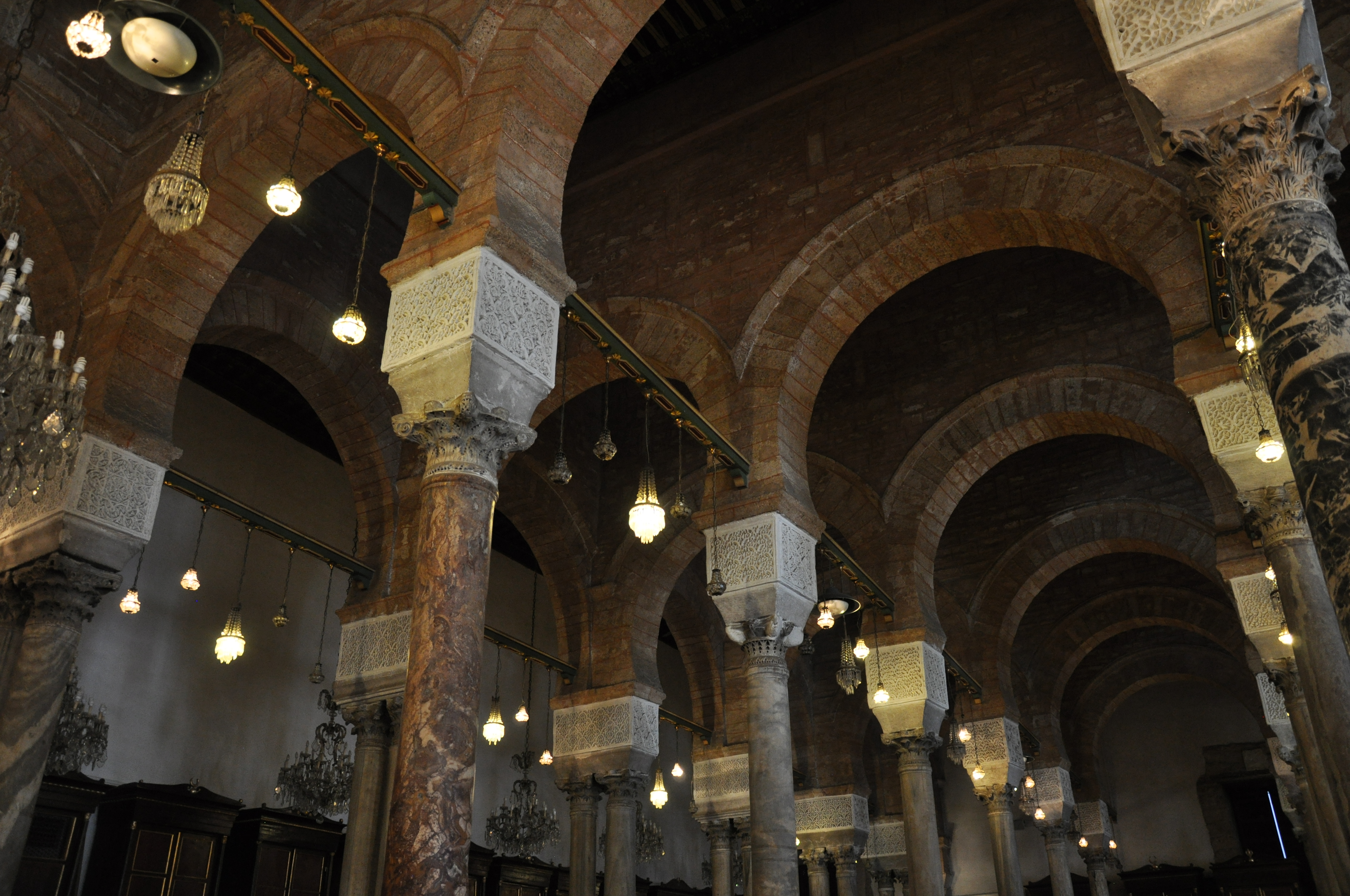 Grande Mosquée (Djamaa Zitouna)